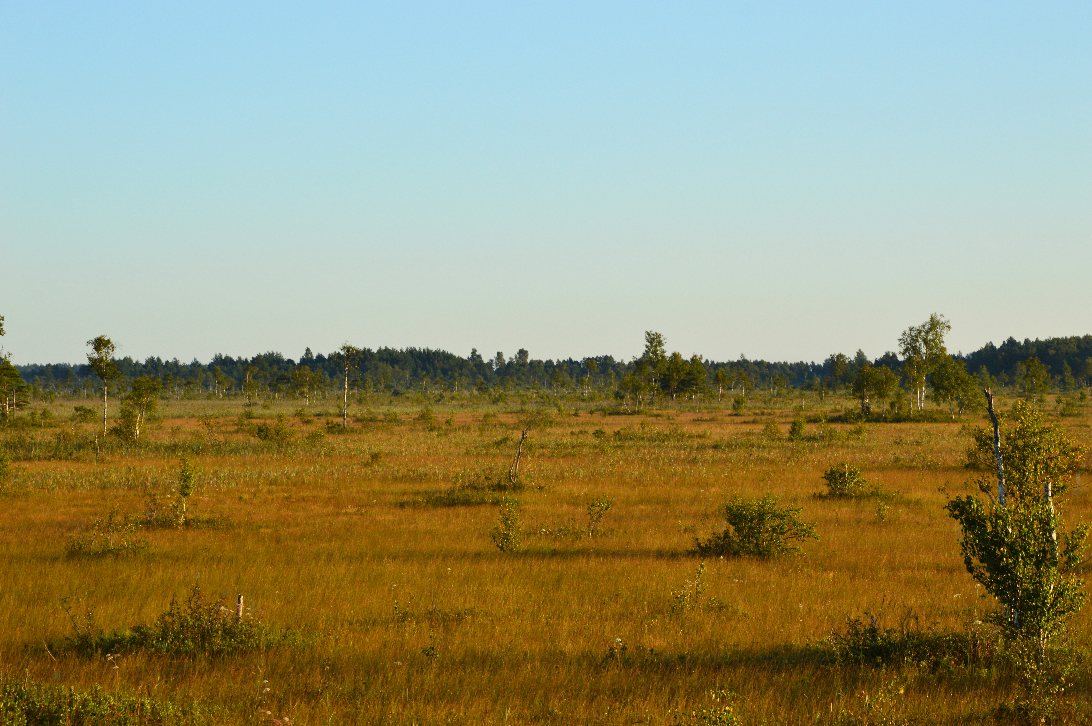 Avaste soo